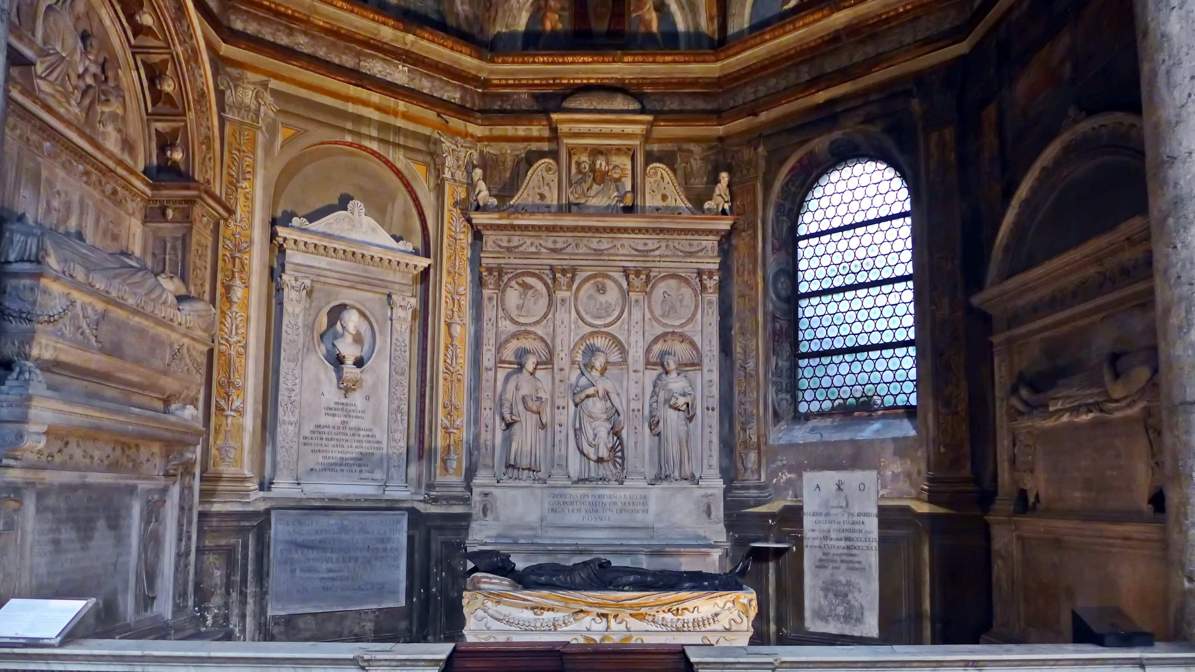 Santa Maria del Popolo Capella Costa